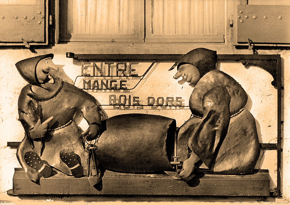 Tullins enseigne des moines XVe s